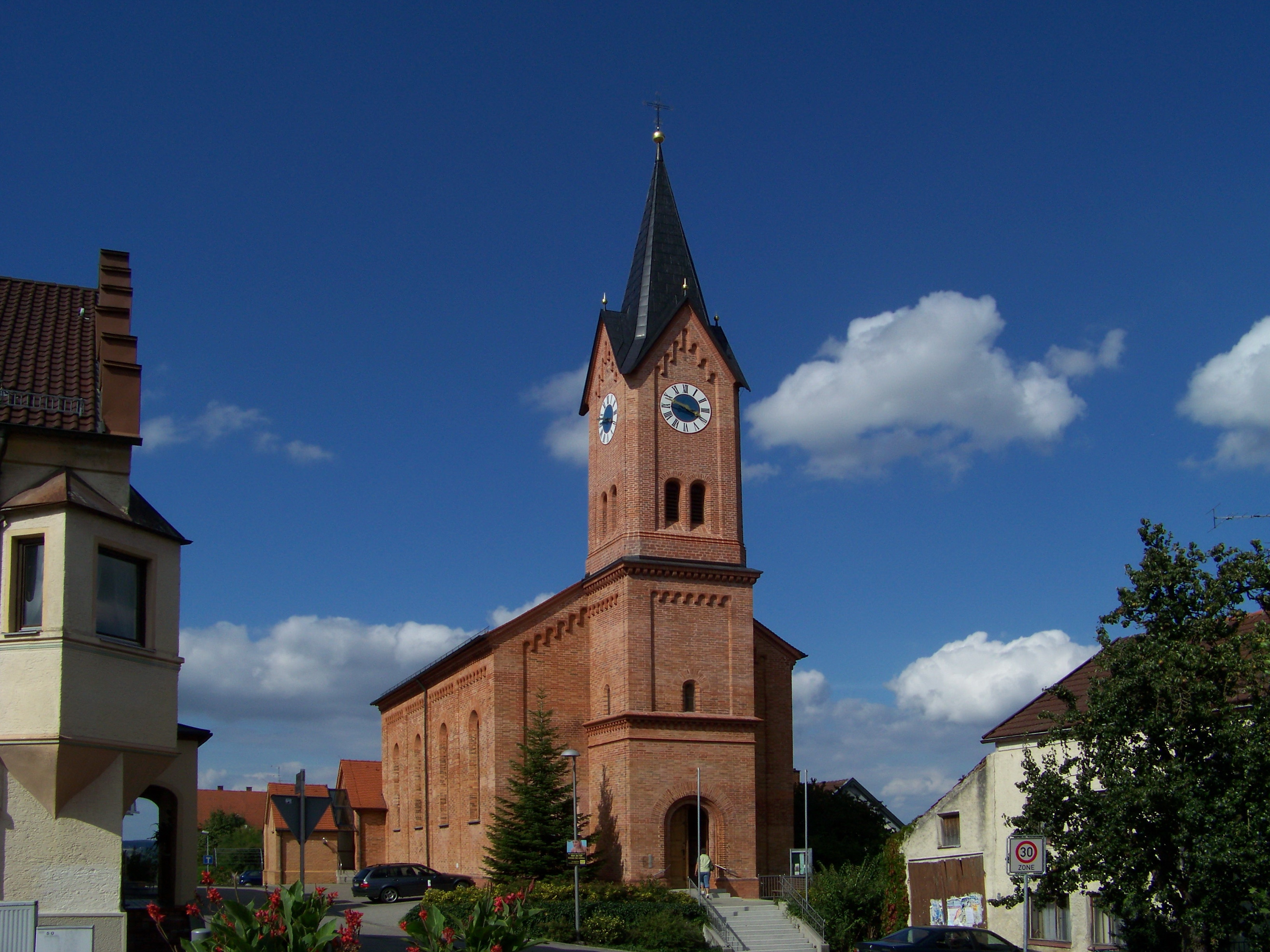 Teisbach, Kirchplatz 10. Katholische Pfarrkirche St. Vitus. Neuromanische Saalkirche mit eingezogenem Chor und Südturm, Backsteinbau von Johann Bernlochner, 1849; mit Ausstattung.